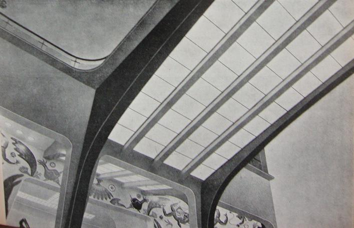 Vista del voladizo y acceso al pullman (1º piso) desde la planta baja, en el Cine Los Ángeles (Avenida Corrientes 1764). En las paredes, los murales originales. Buenos Aires, Argentina.